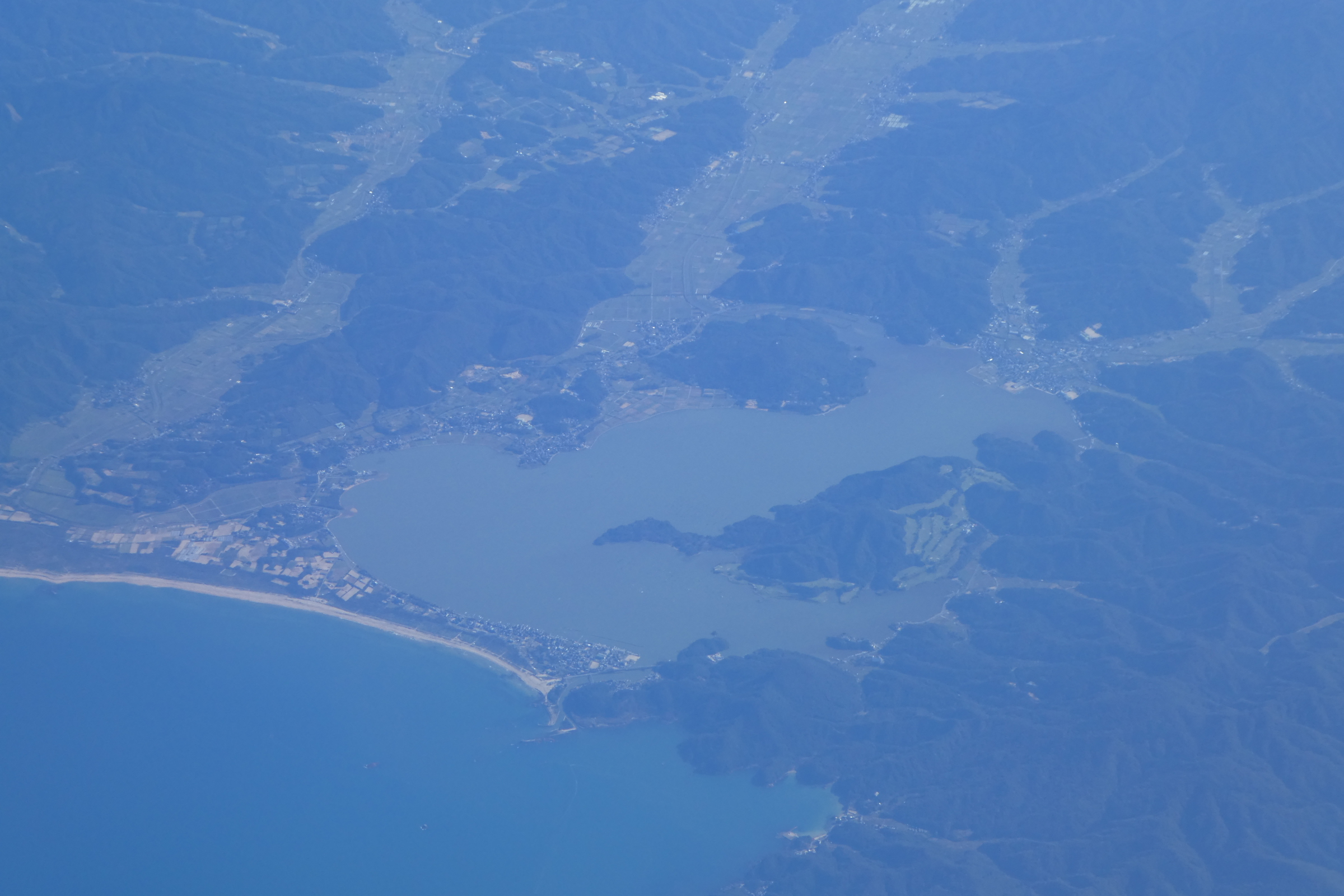 上空から撮影した小天橋。